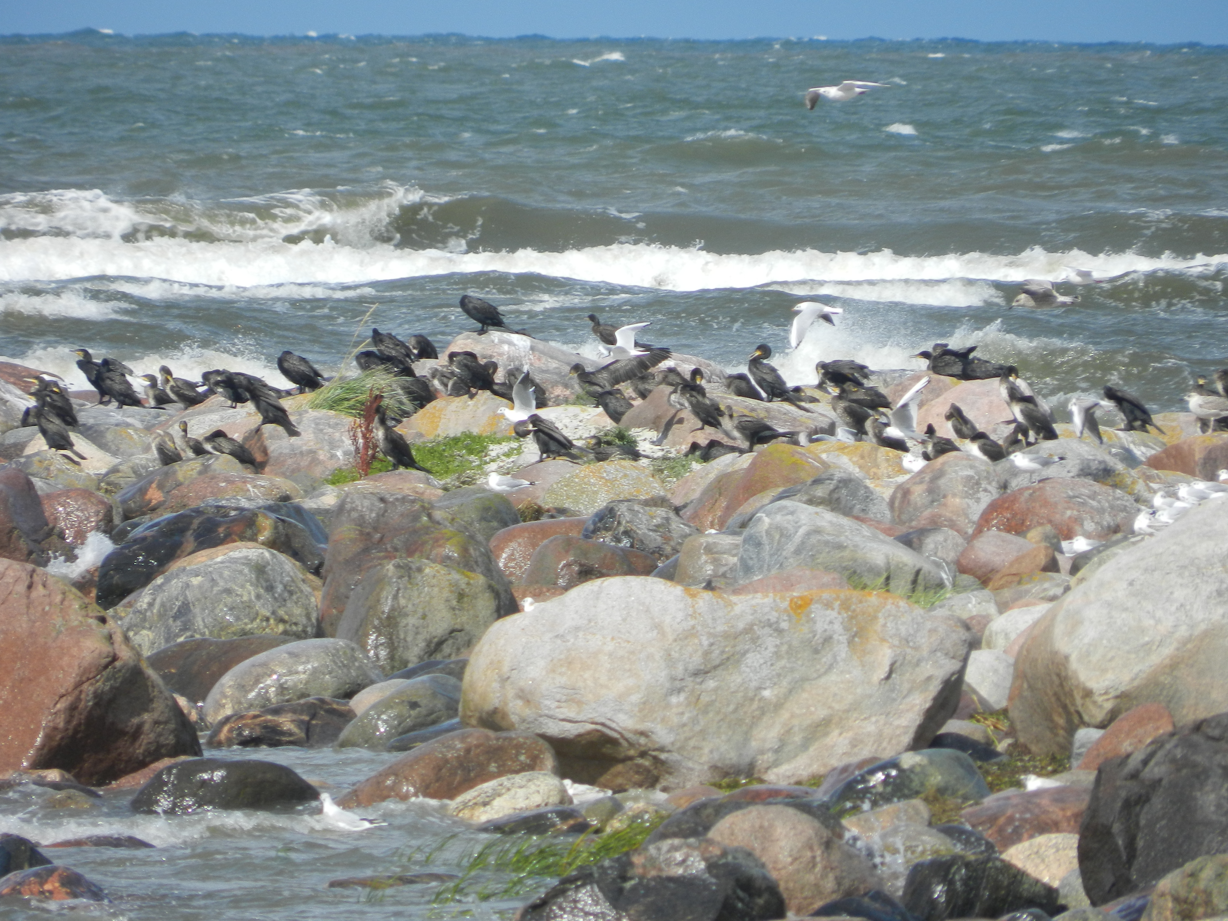 Linnud Põõsaspea neemel.